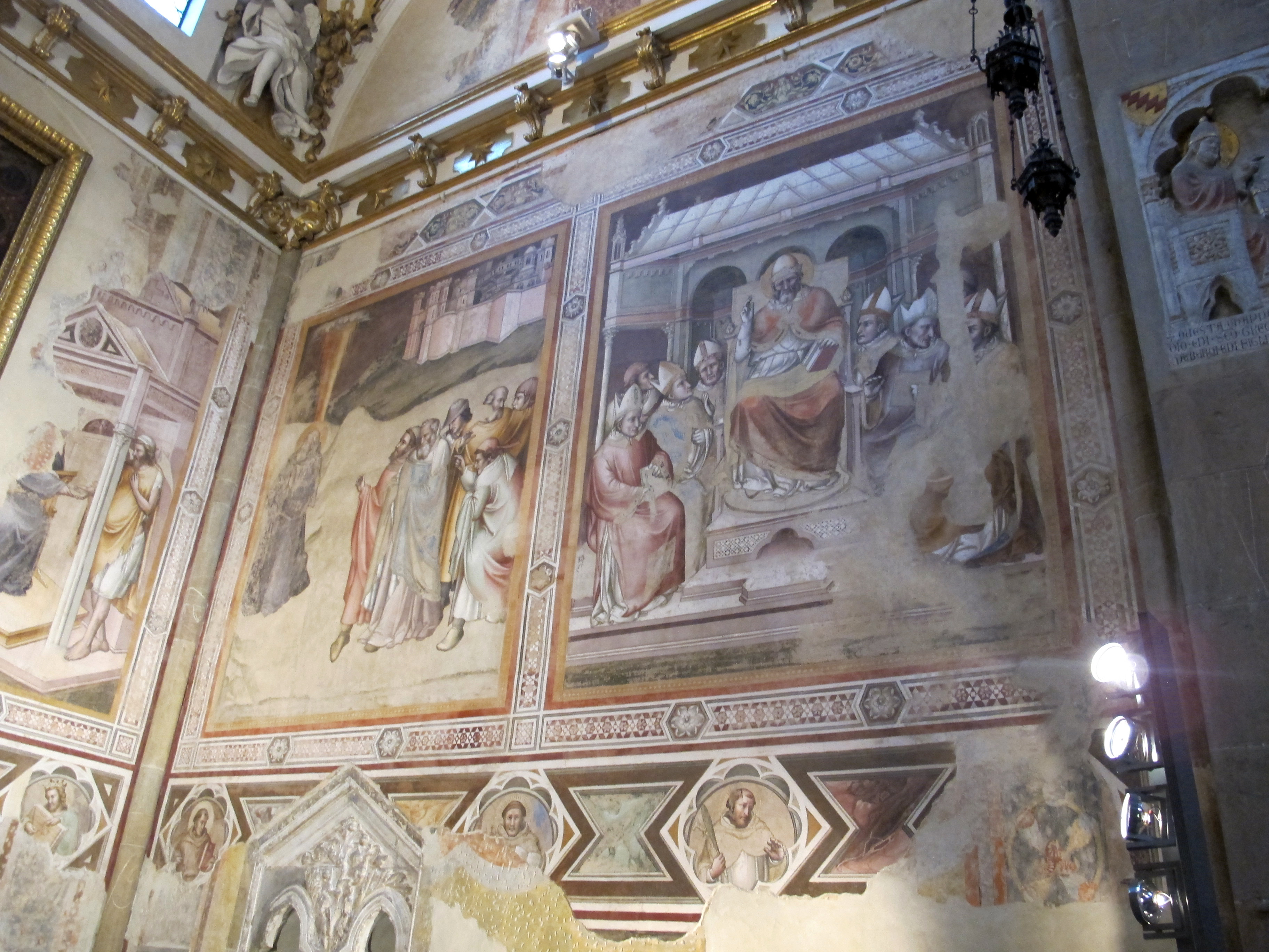 Cappella bardi di smn, affreschi di pseudo dalmasio